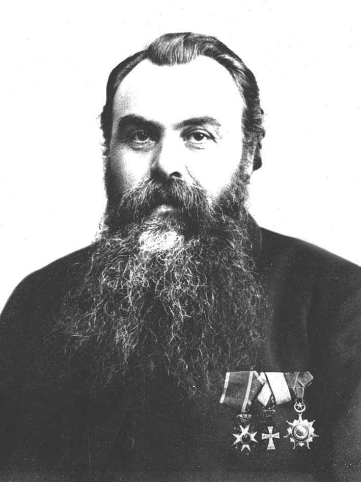 Norwegian gunsmith Erik Jørgensen (1848-1896)